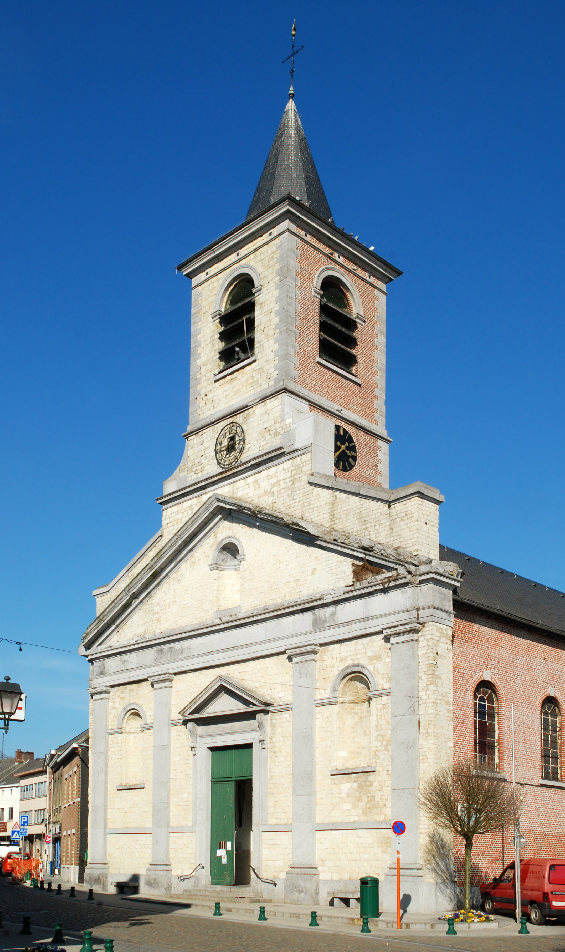 Belgique - Wallonie - Église Saint-Jean l'Évangéliste de Genappe